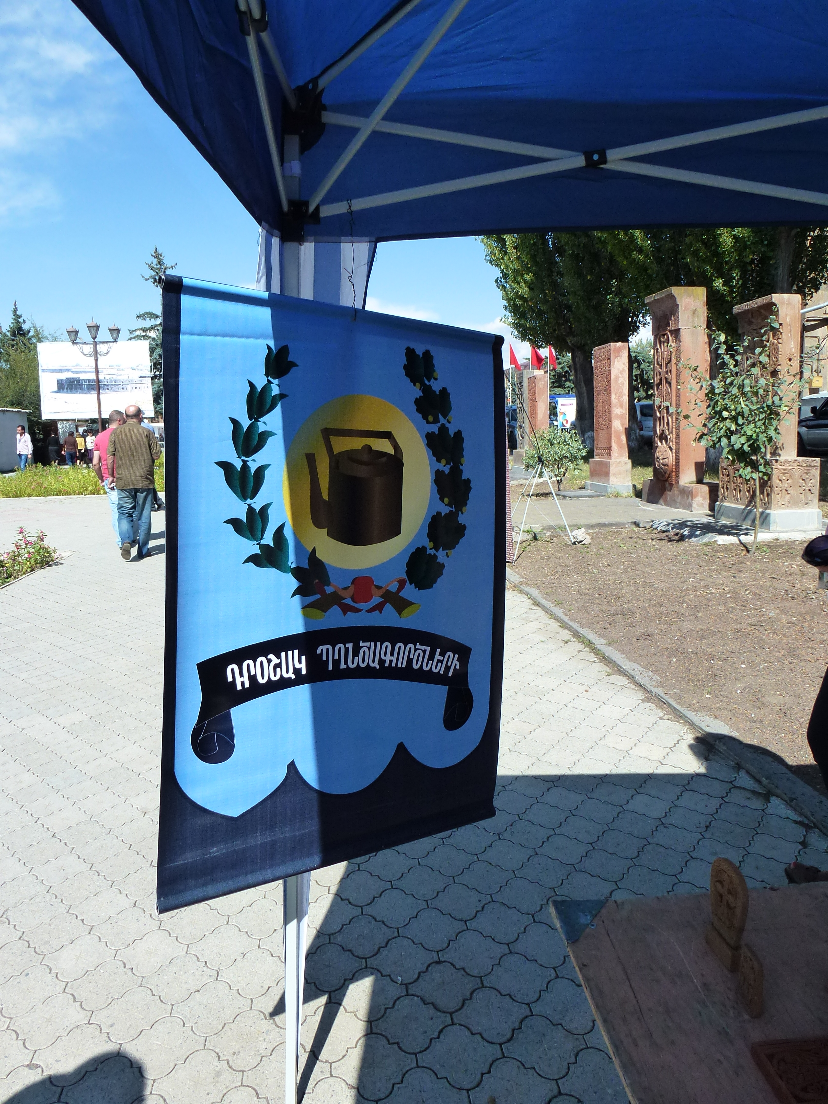 Գյումրու պղնձագործների համքարության դրոշը